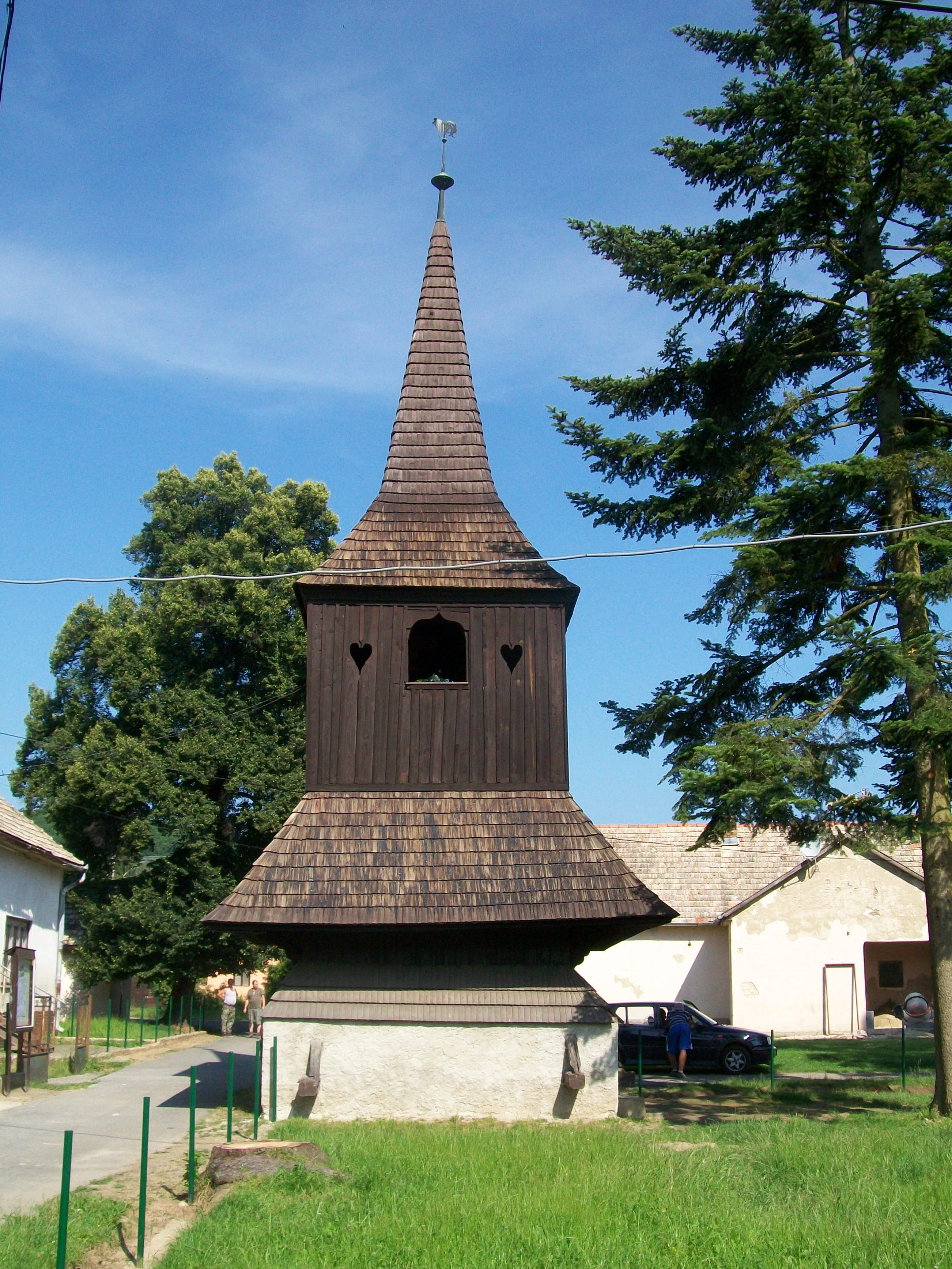 Drevená zvonica vyhotovená v roku 1791 (kultúrna pamiatka)